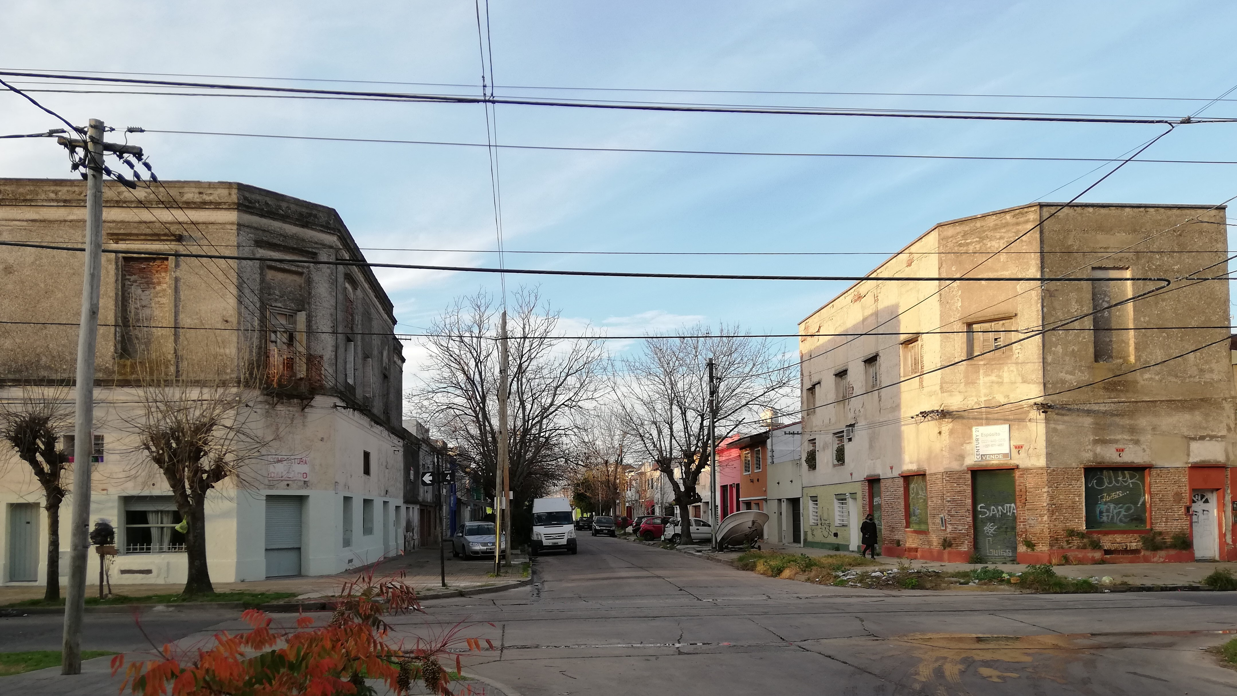 Viviendas típicas del primer barrio obrero de Latinamérica: Las Mil Casas, calle 523 y 4, Tolosa